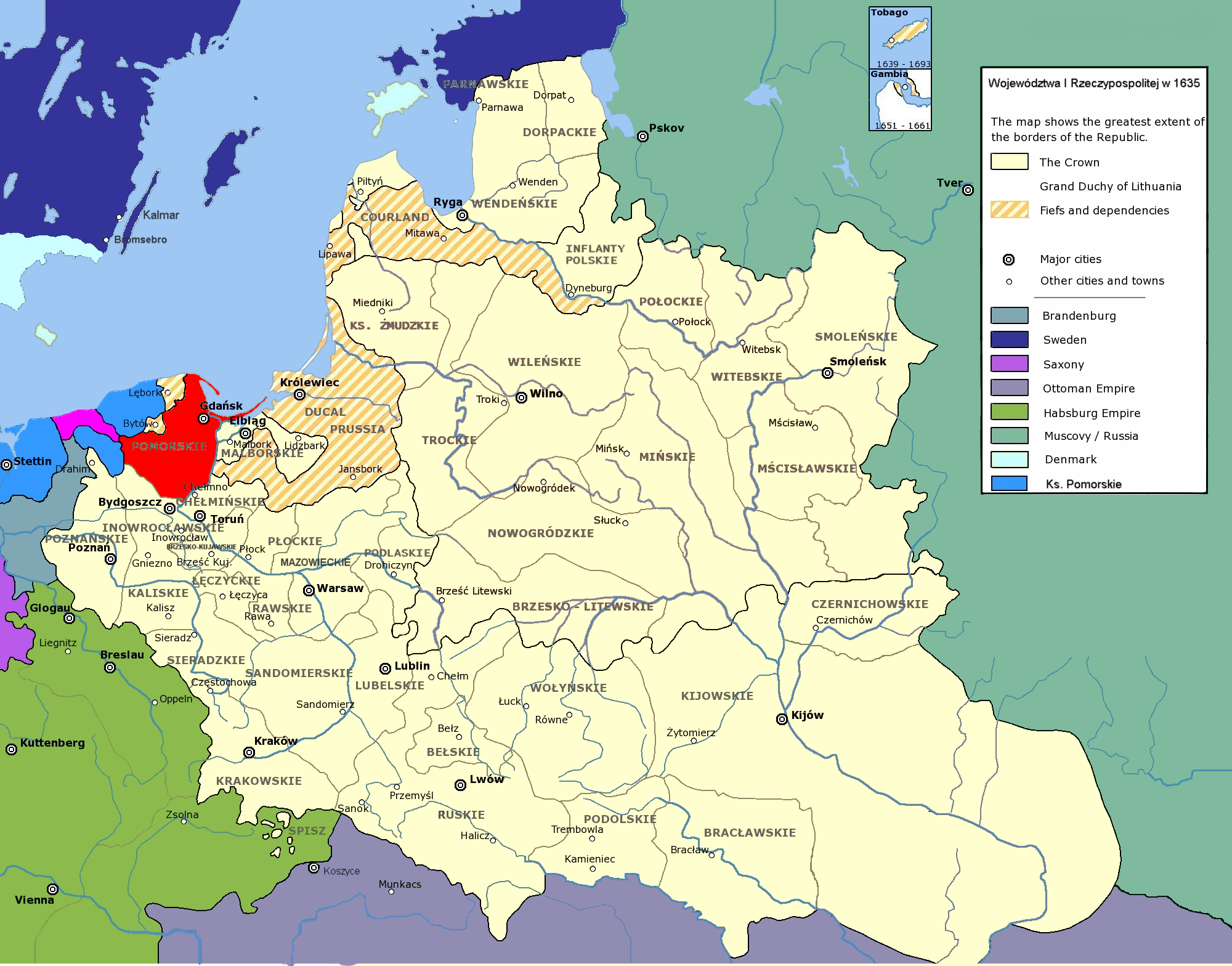 Rzeczpospolita Obojga Narodów w 1635 r.; województwo pomorskie Polish-Lithuanian Commonwealth in 1635; Pomorze Voivodeship